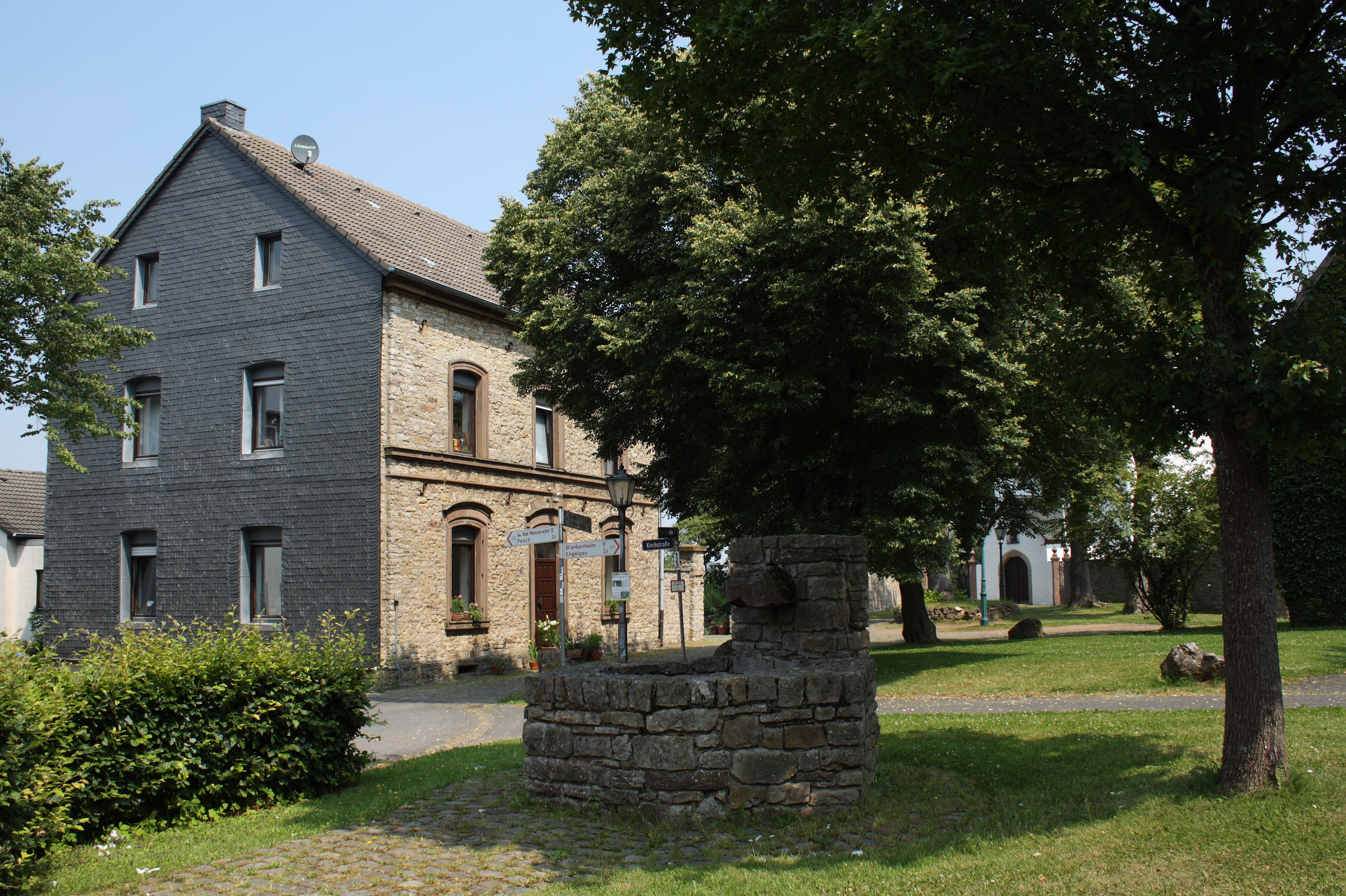 Pfarrhaus in Zingsheim, einem Ortsteil von Nettersheim im Kreis Euskirchen (Nordrhein-Westfalen)